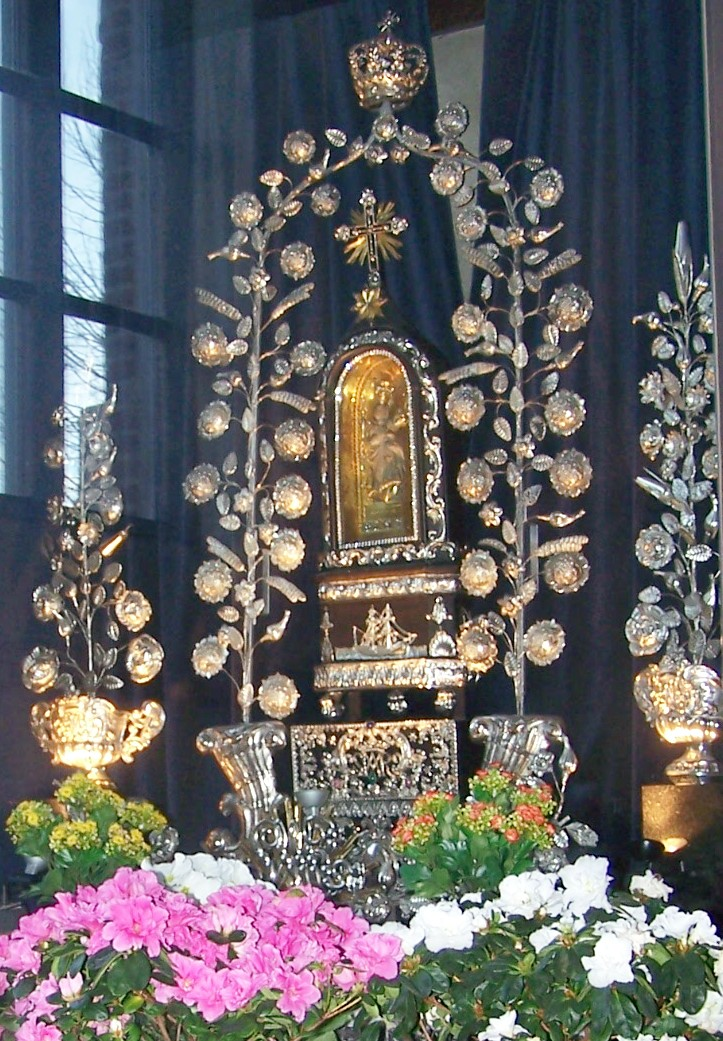 Miraculeus Mariabeeldje in linkerzijbeuk